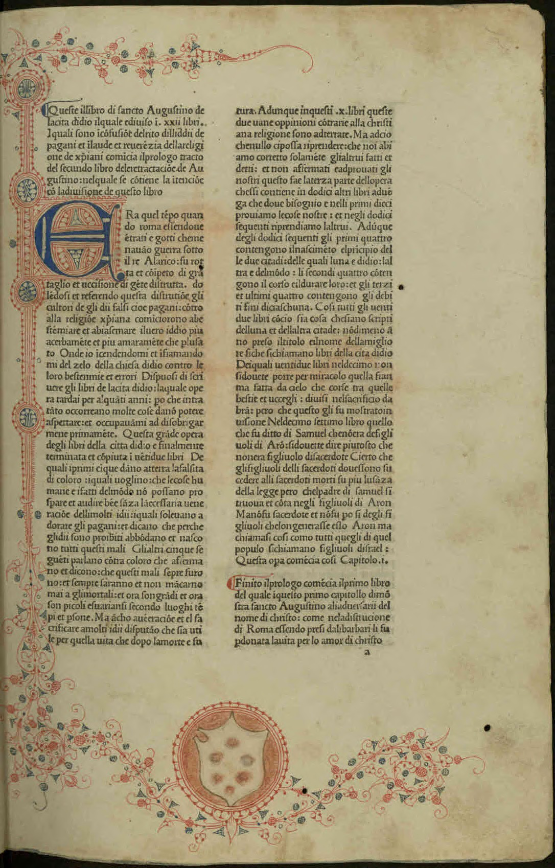 De civitate Dei (italiano). - [Venezia] : [Antonio Miscomini], [circa 1483]. - 324 c. ; a¹², a-z¹⁰, A-G¹⁰, H¹² ; 4°. - Stampa attribuita anche a Firenze. - Manca la c. H12 (bianca) . Carta a1r dell'incunabolo